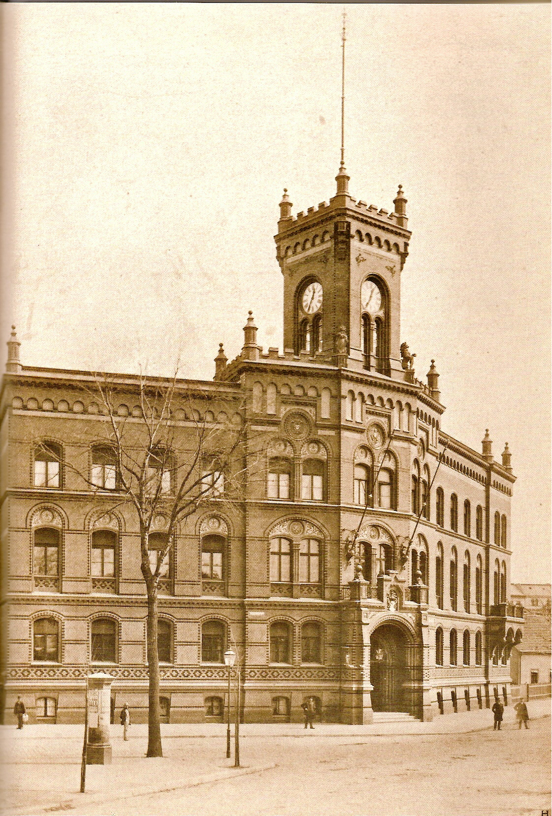 Rathaus Wilmersdorf Gasteiner Straße um 1900